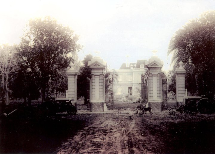 Estancia Echeverry, Merlo, Provincia de Buenos Aires.